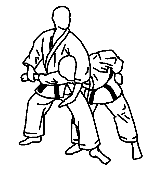 Técnica de imobilização com a linha de cintura